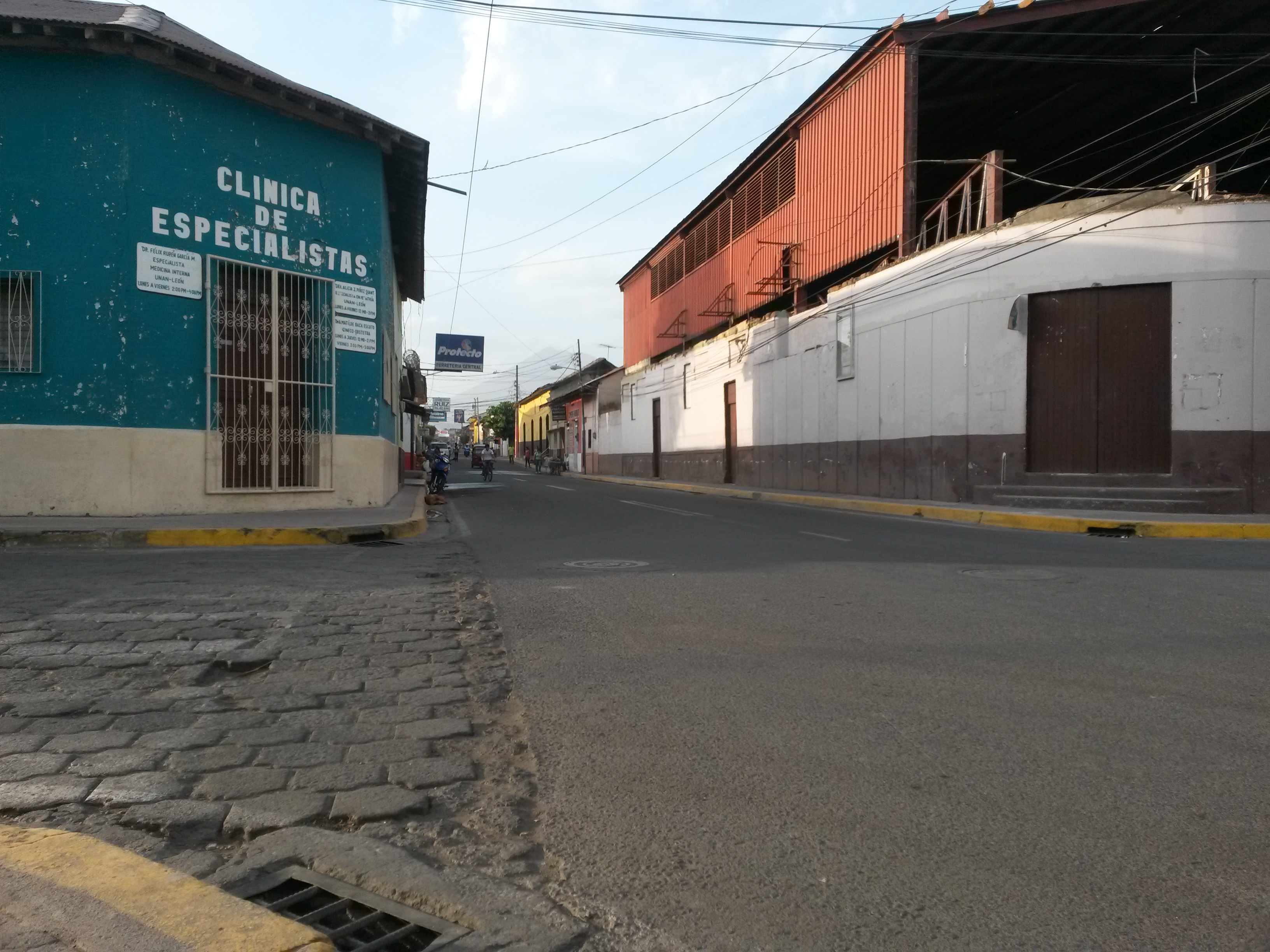 Avenida Central Tambien Se Nota Las Calles Plomas Debido A La Erupción Del Volcan Telica